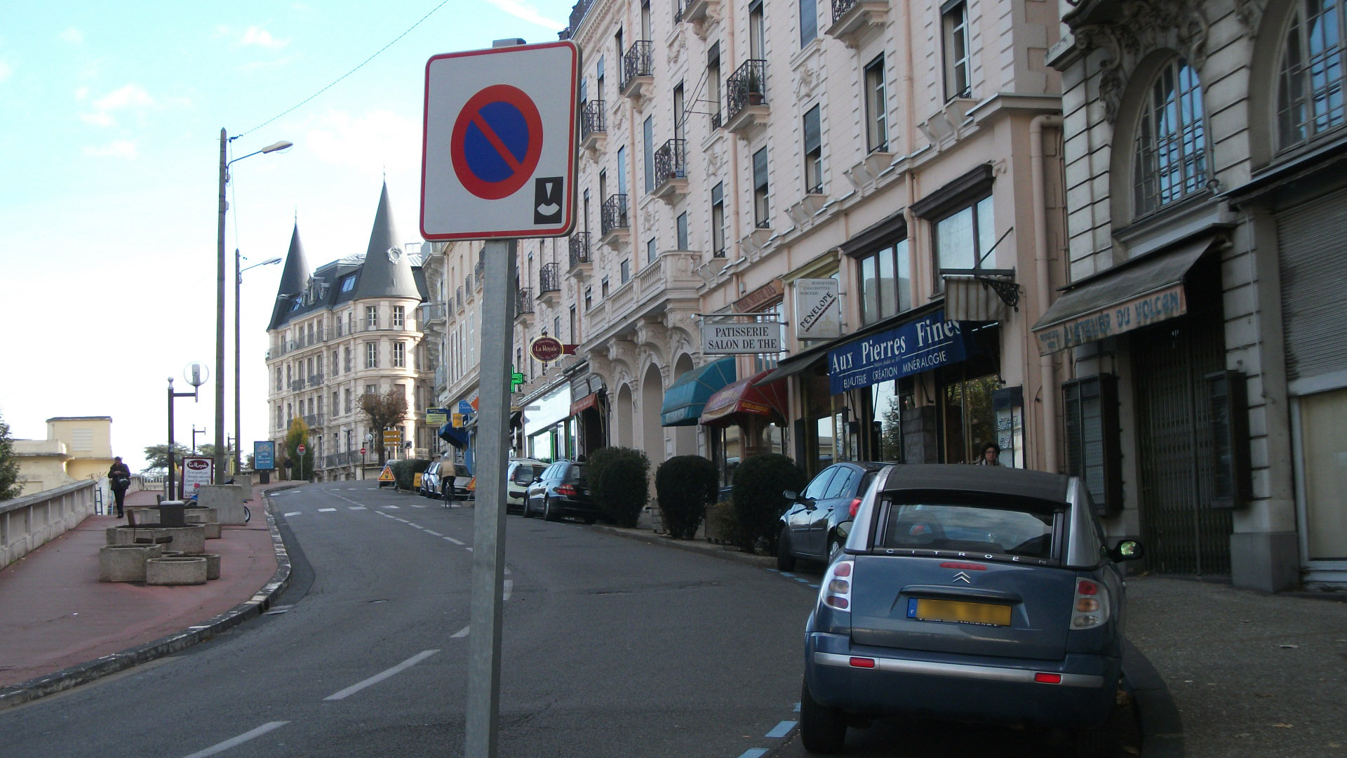 Stationnement à durée limitée avec contrôle par disque (nouveau panneau). Entrée. Signaux Girod 2009